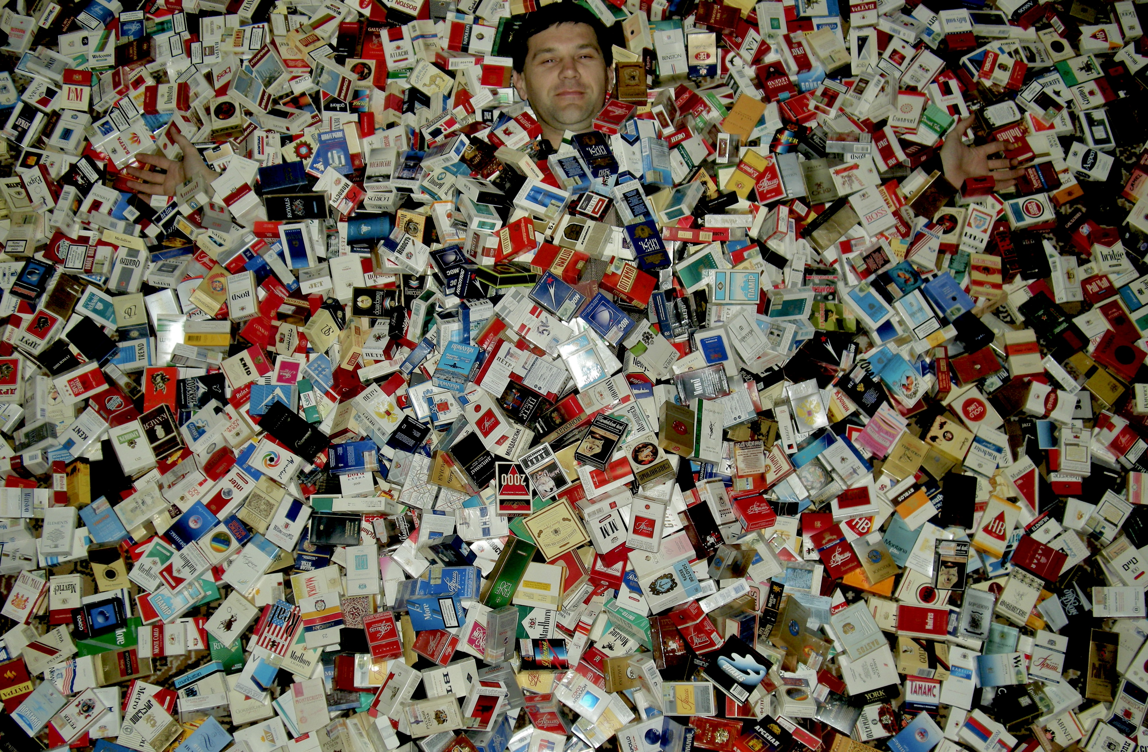 Потапенко В.Д.